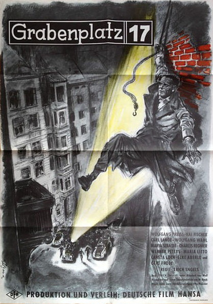 Plakat zum Film: Grabenplatz 17